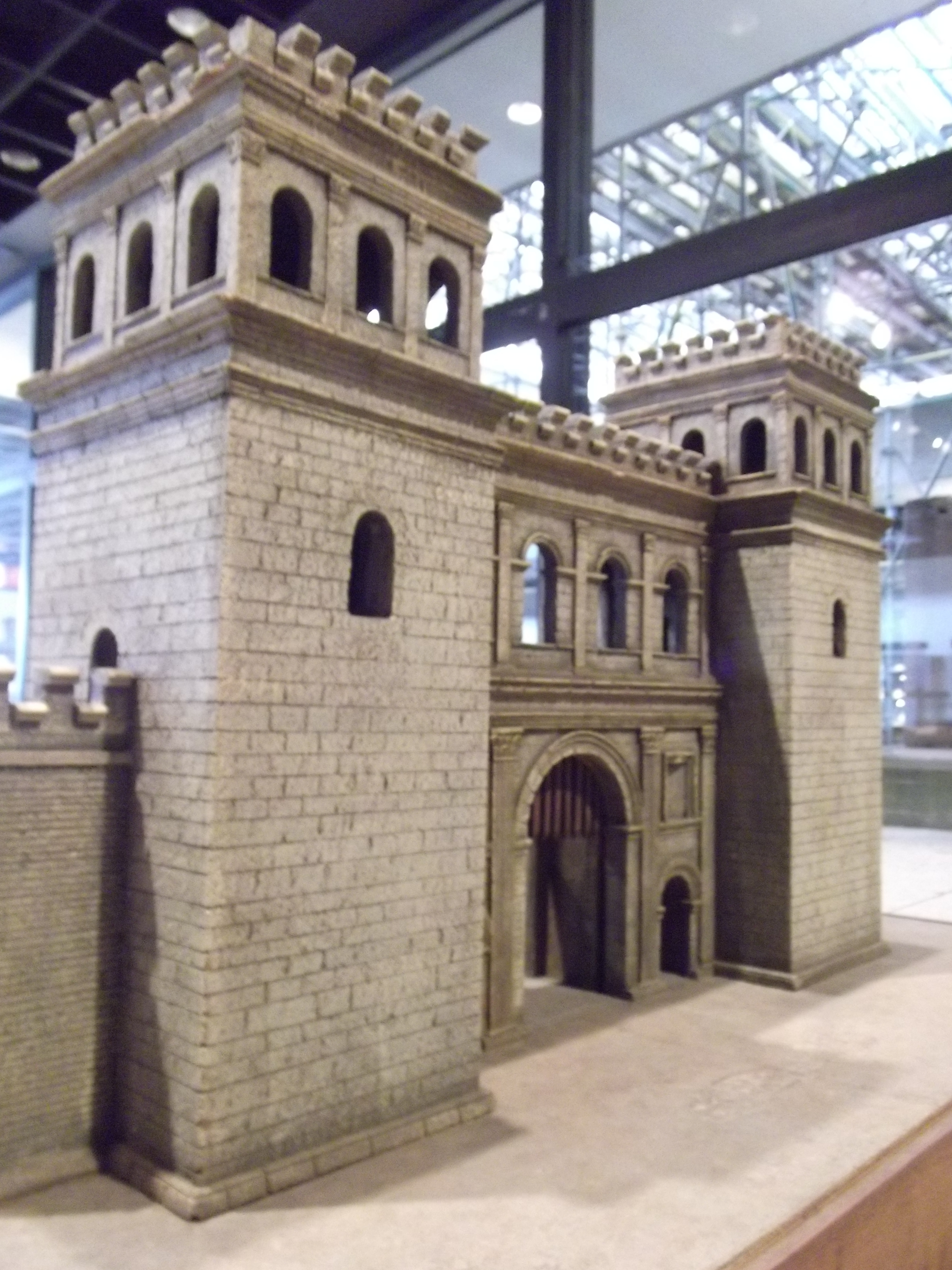 Römisch-Germanisches Museum (RGM) Köln: Model des Römischen Nordtors der C.C.A.A., Maßstab 1:50, Rekonstruktion: H. Mylius Datierung: 50 n. Chr. FO: Köln Beschreibung nach Museumstafel: Das Modell aus den 1950er Jahren rekonstruiert das monumentale Nordtor, das einzige Torgebäude in der Nordseite der römischen Stadtmauer. Im Museum ausgestellt sind originale Steine des mittleren Torbogens mit der Inschrift des Stadtnamens C[olonia] C[laudia] A[ra] A[grippinensium].